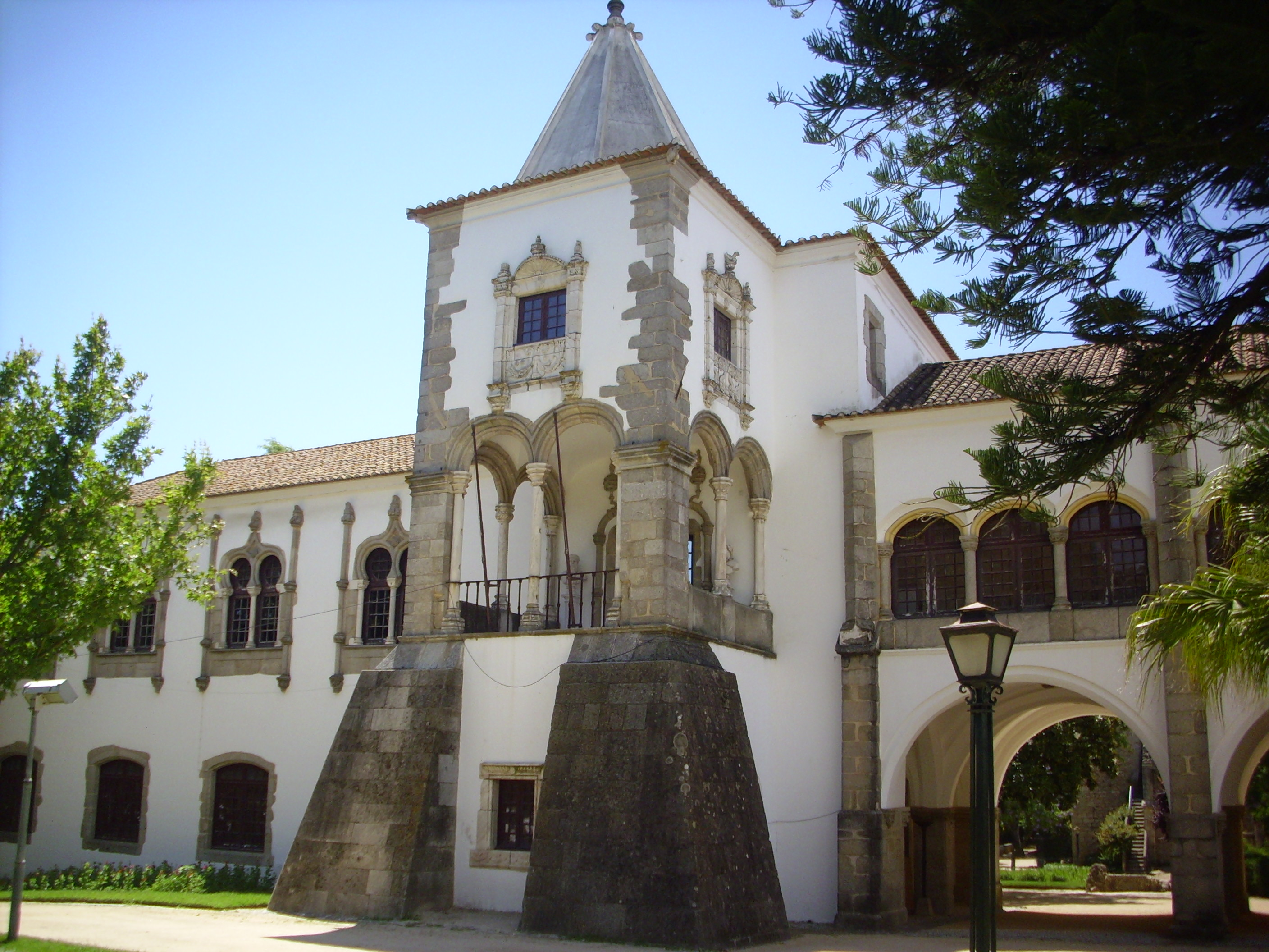 Evora